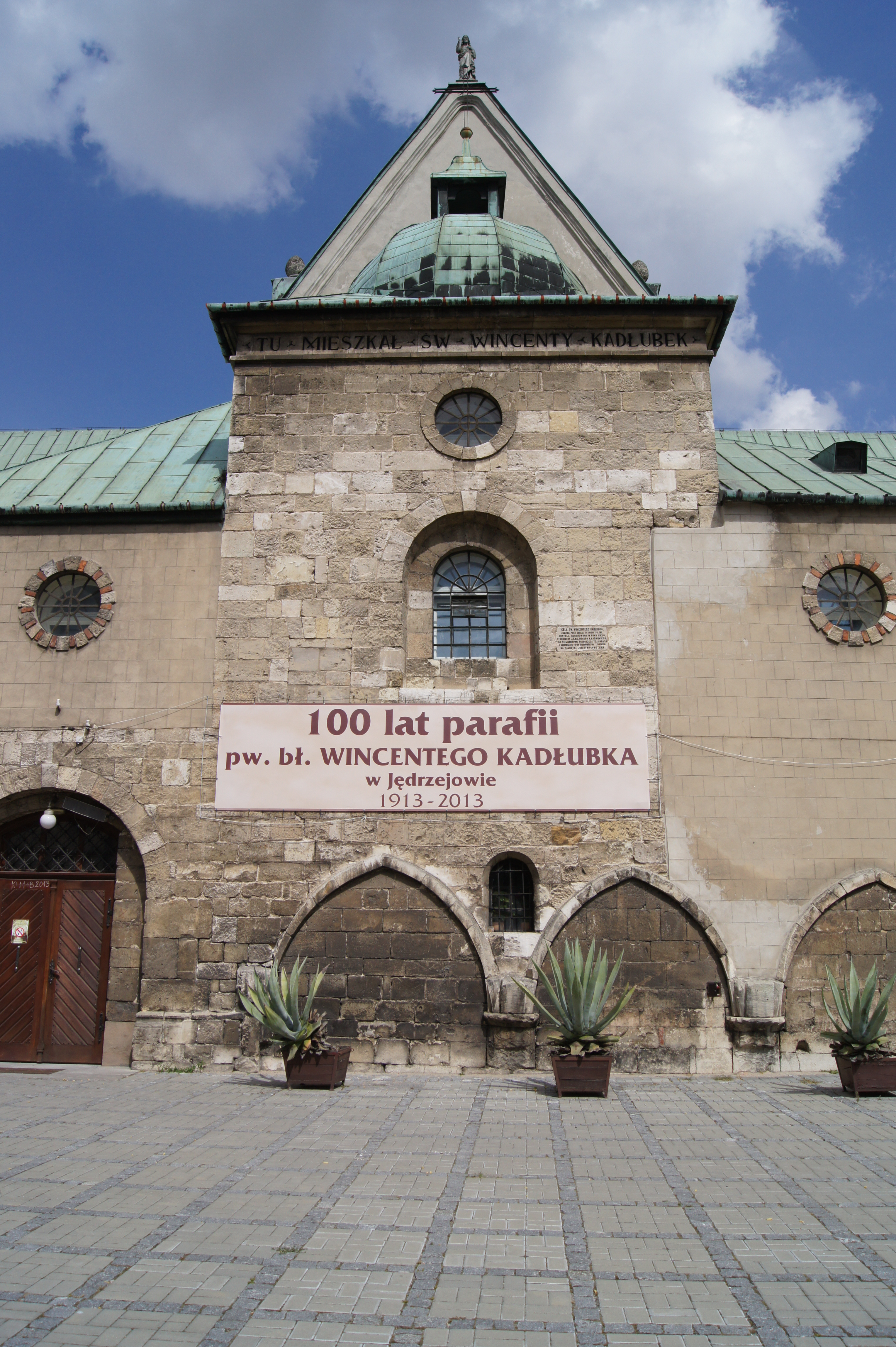 Cistercian Abbey in Jędrzejów Native nameArchiopactwo Cystersów w JędrzejowieLocationJędrzejówCoordinates50° 39′ 13″ N, 20° 17′ 04″ E Established1140Authority control : Q1775407 Cela Wincentego Kadłubka